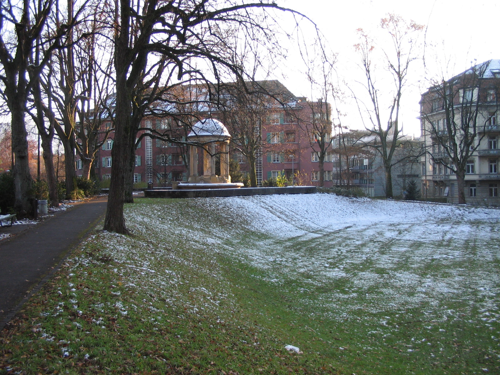 Florapark Bern